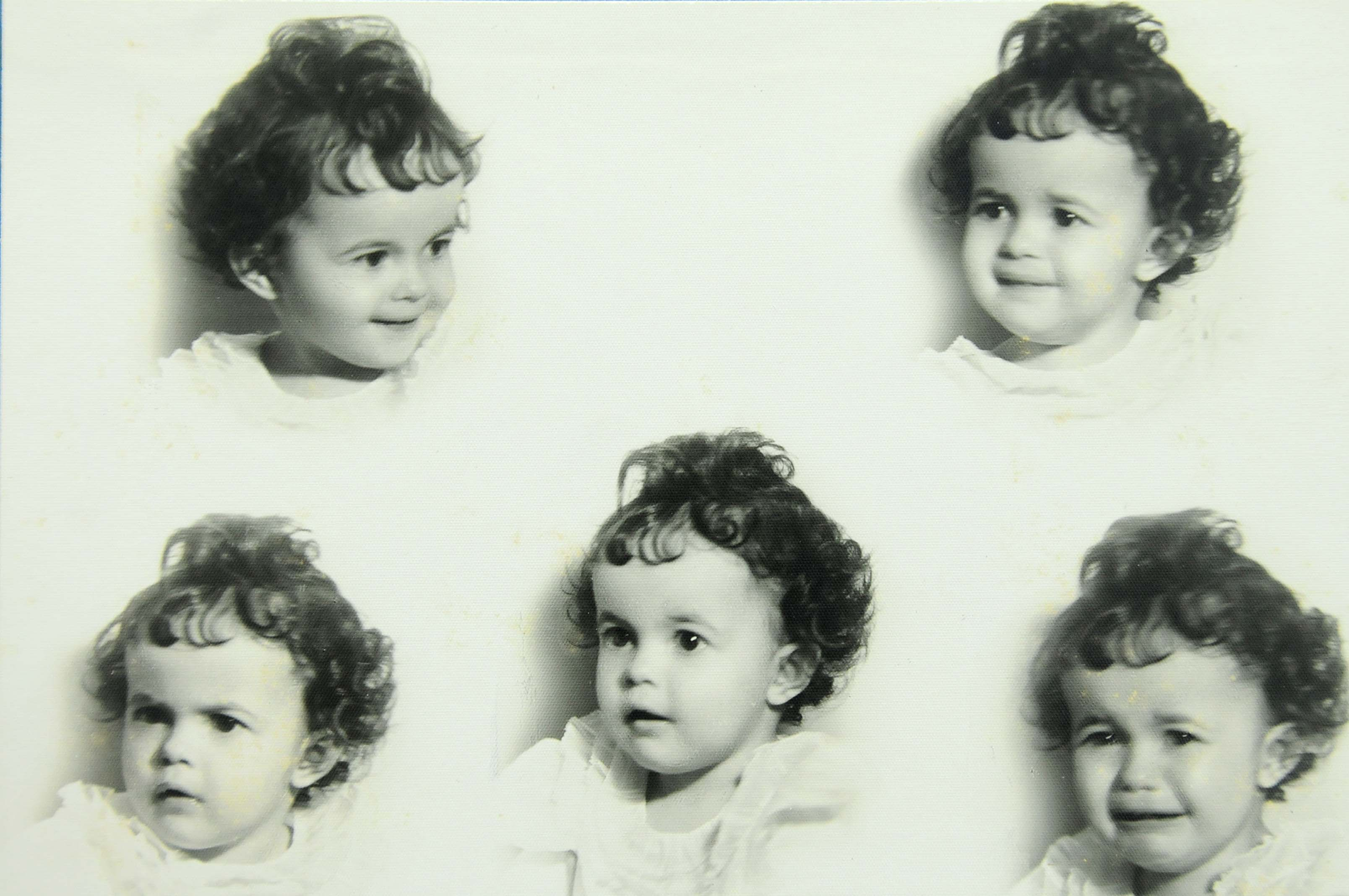 Quadro de Dilma Rousseff ainda bebê.